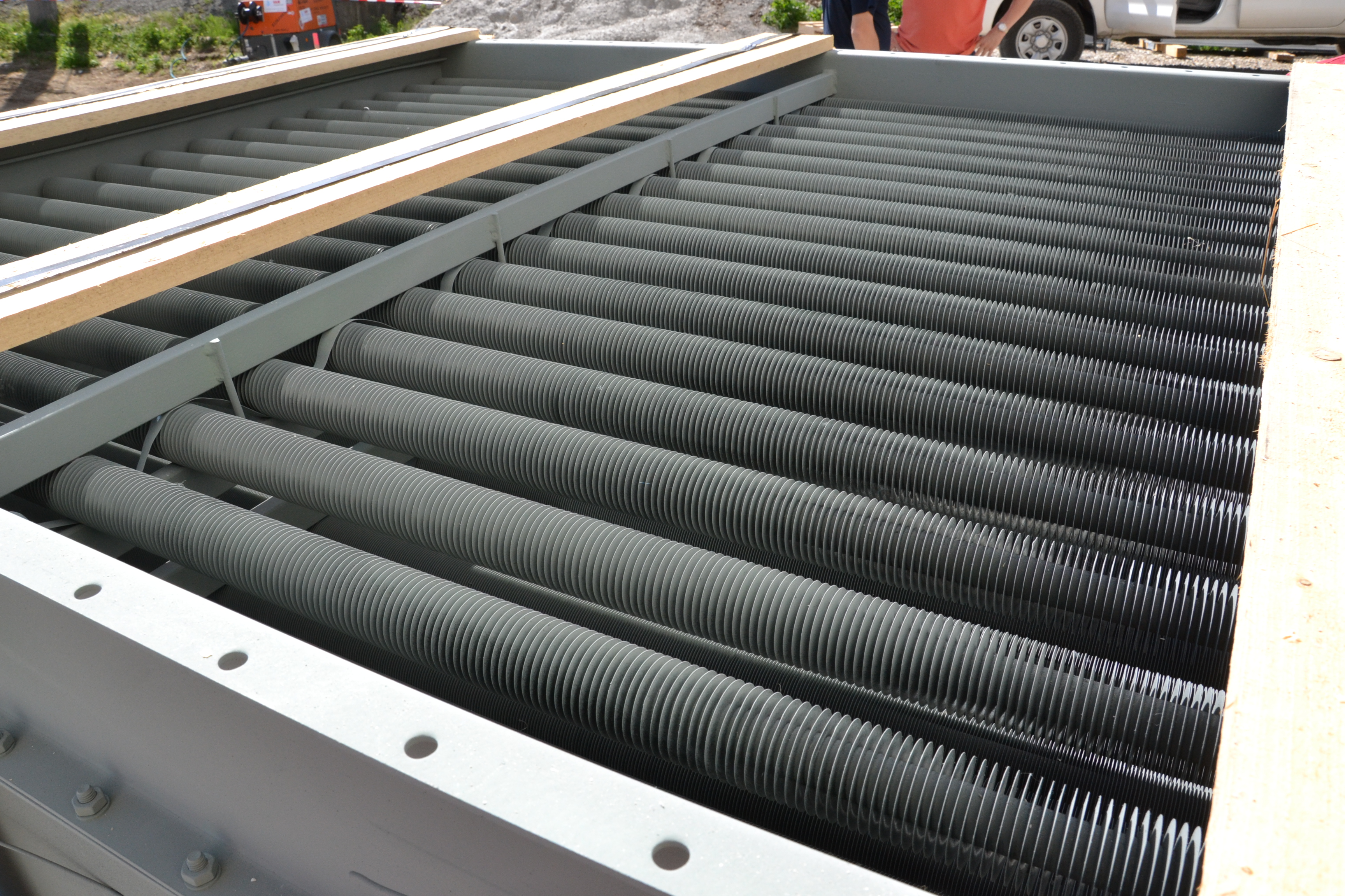 Rippenrohre des Luftvorwärmetauschers des Biomasseheizkraftwerkes Steyr